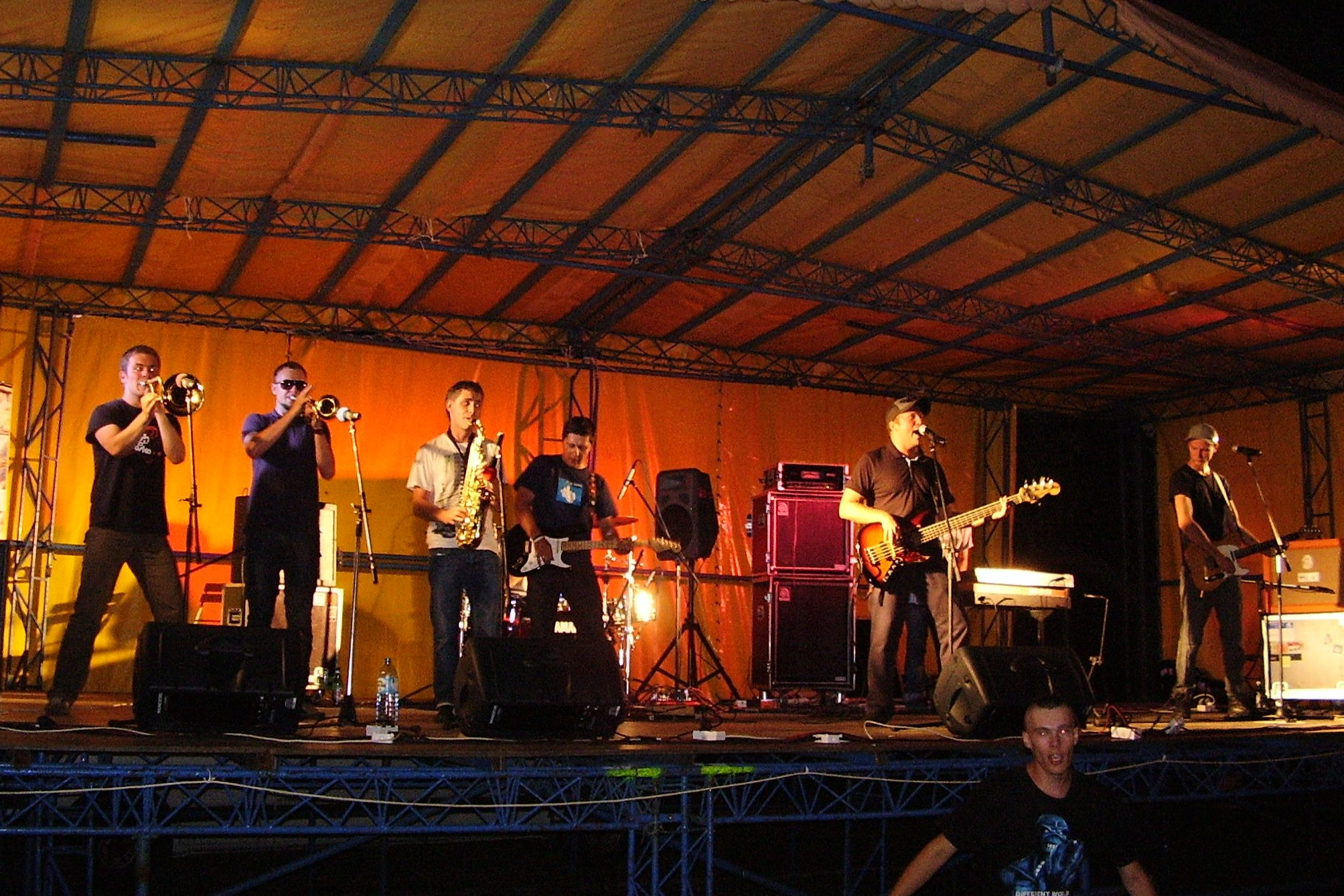 Cała Góra Barwinków koncert w Nowej Dębie 2010-07-30